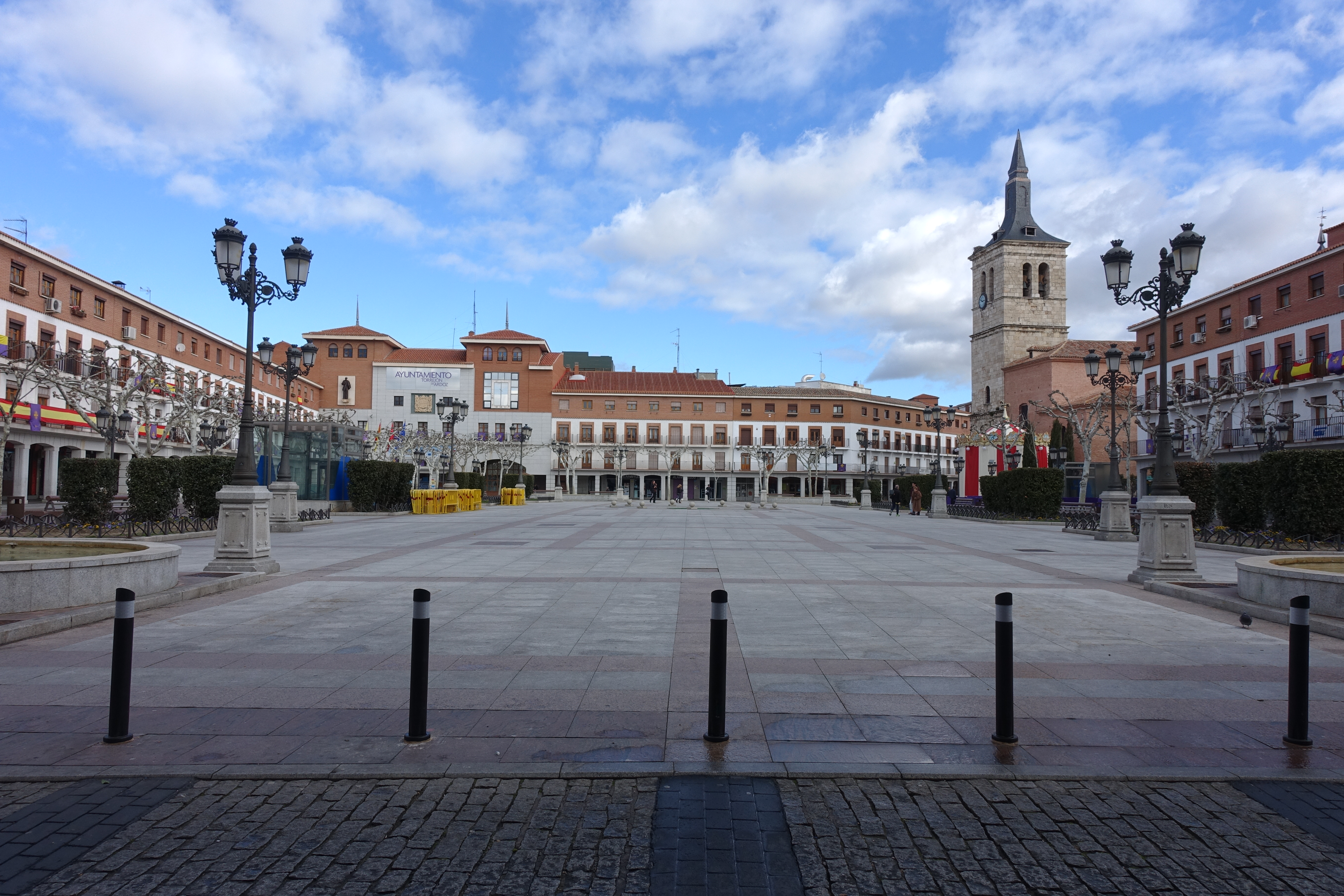 Plaza Mayor de Torrejón de Ardoz (Madrid, España).